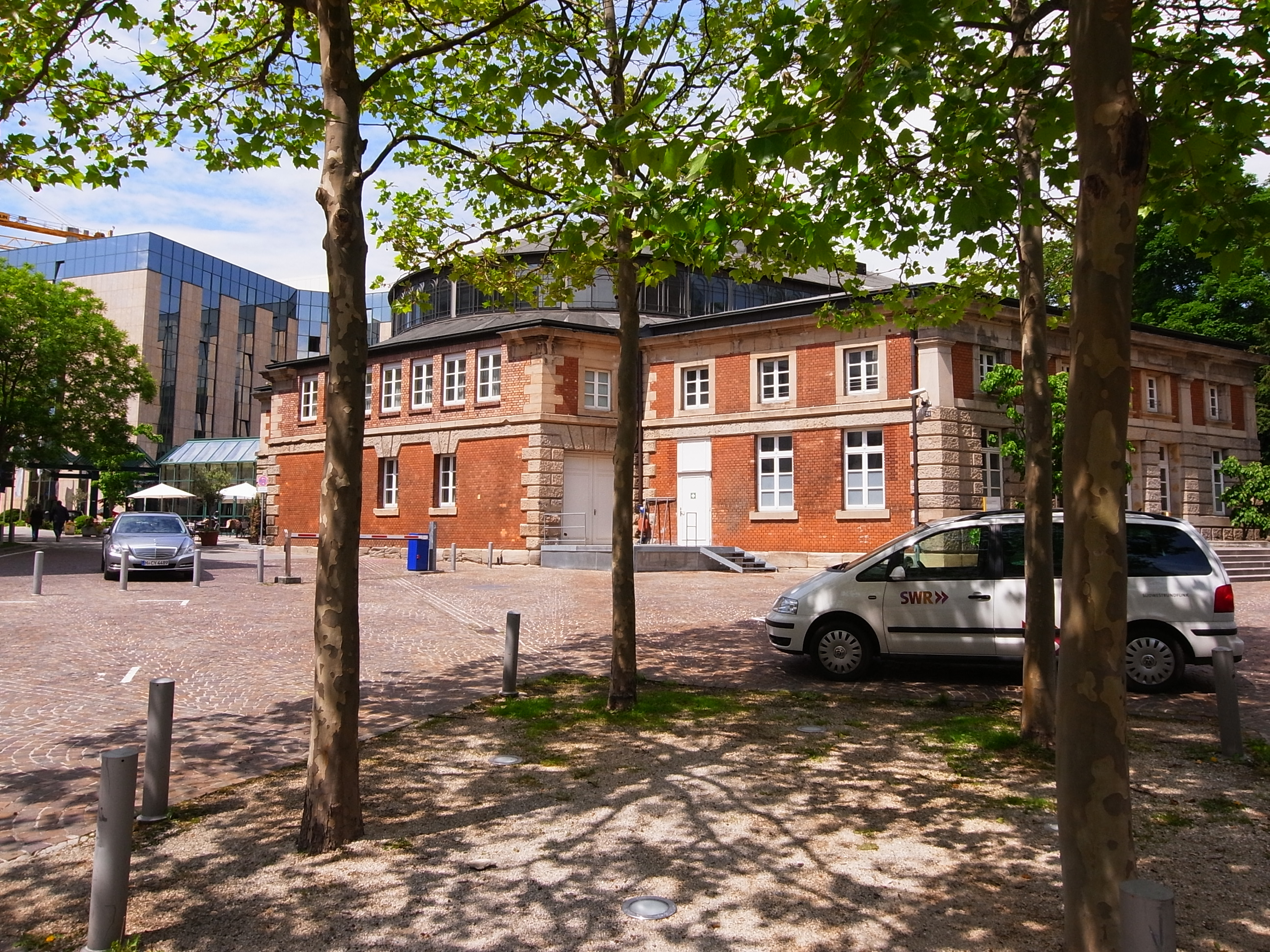 Die Alte Reithalle von Südost nach Nordwest erfasst